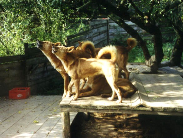 Das ist so um 9:00 in der Früh. Da haben sie sehr uft gemeinsam geheult...vielleicht um denTag zu begrüßen